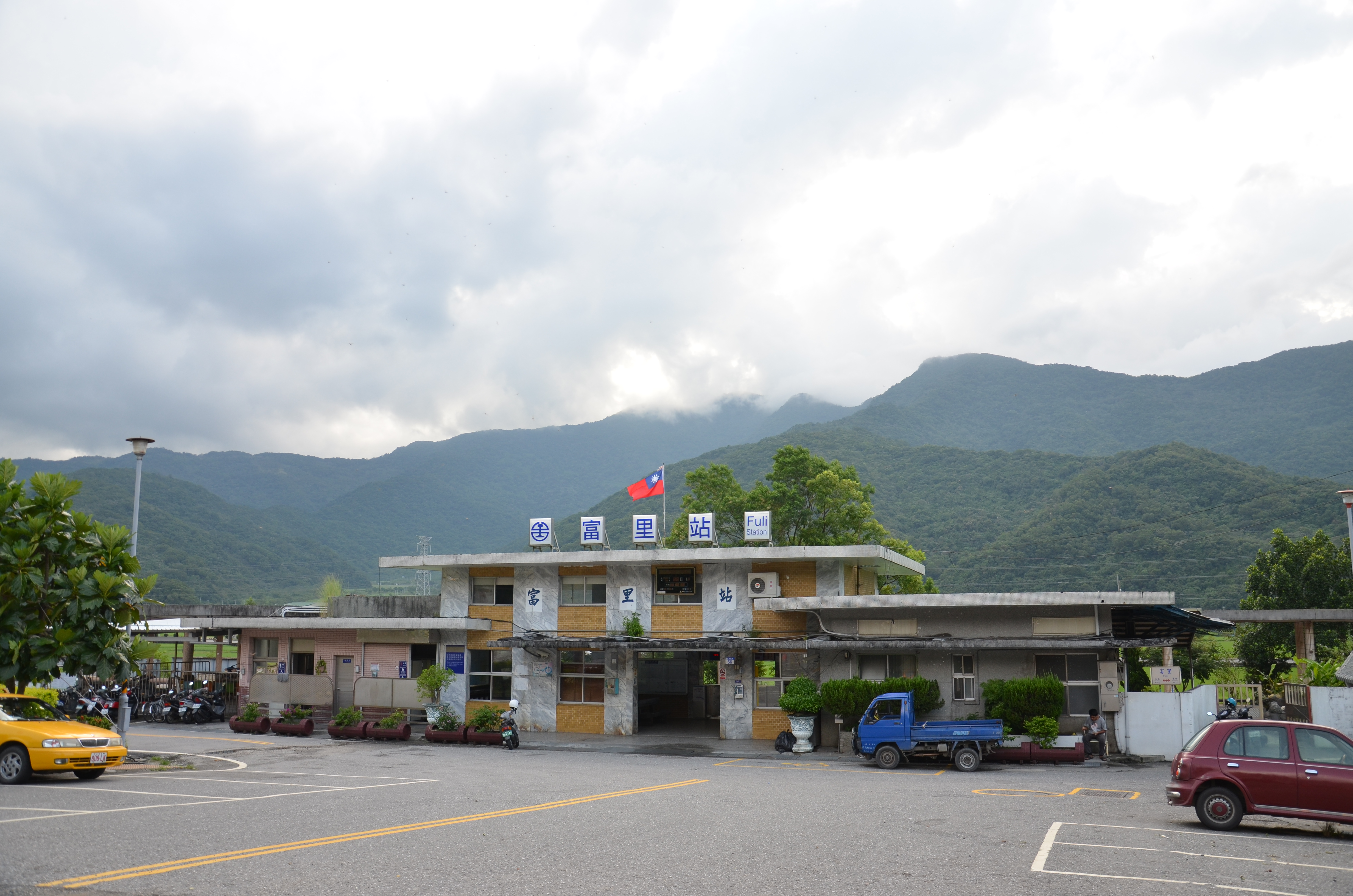 中文（台灣）: 富里車站-站體